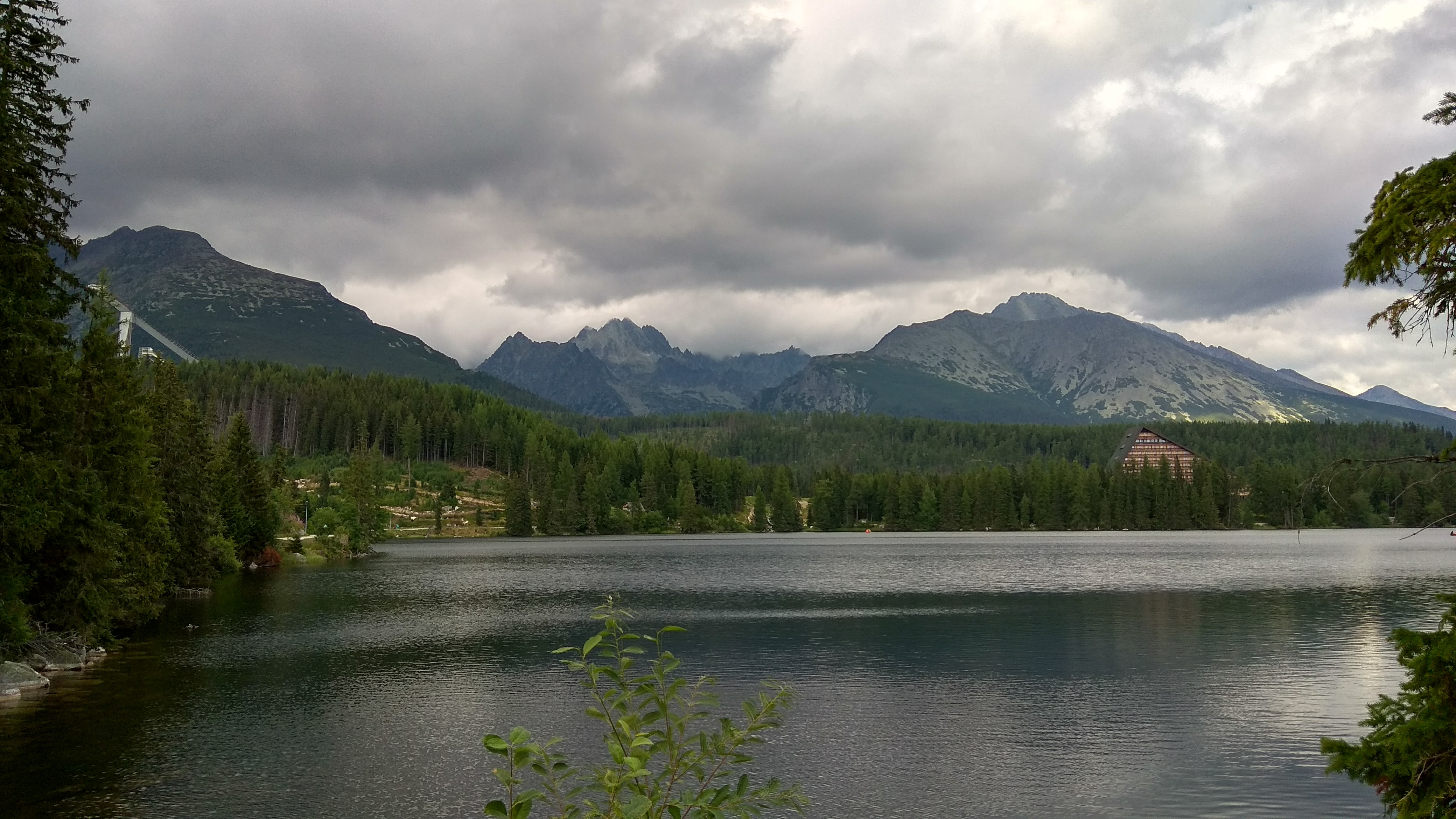 Panorma vyfoceno před začátkem bouřky.